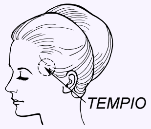 Bildigo de la homa tempio Fonto: la dosiero :image:Temple (anatomy) (PSF).svg kun anglalingva priskribo el la vikipedia komunejo Kreinto: Pearson Scott Foresman